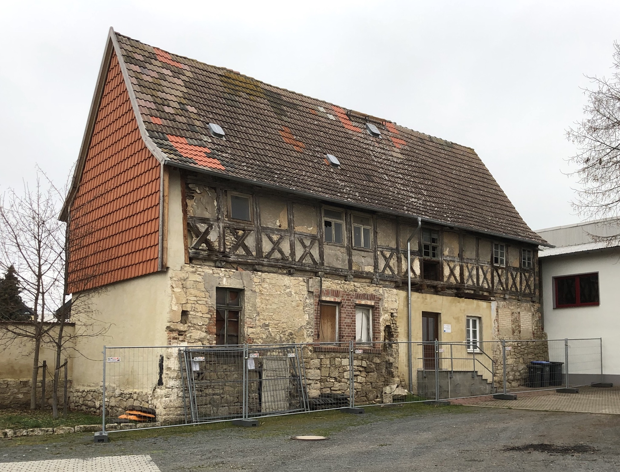 Rest Goldener Löwe in Hedersleben